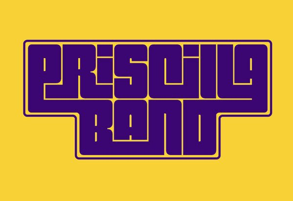 Logo de Priscilla Band